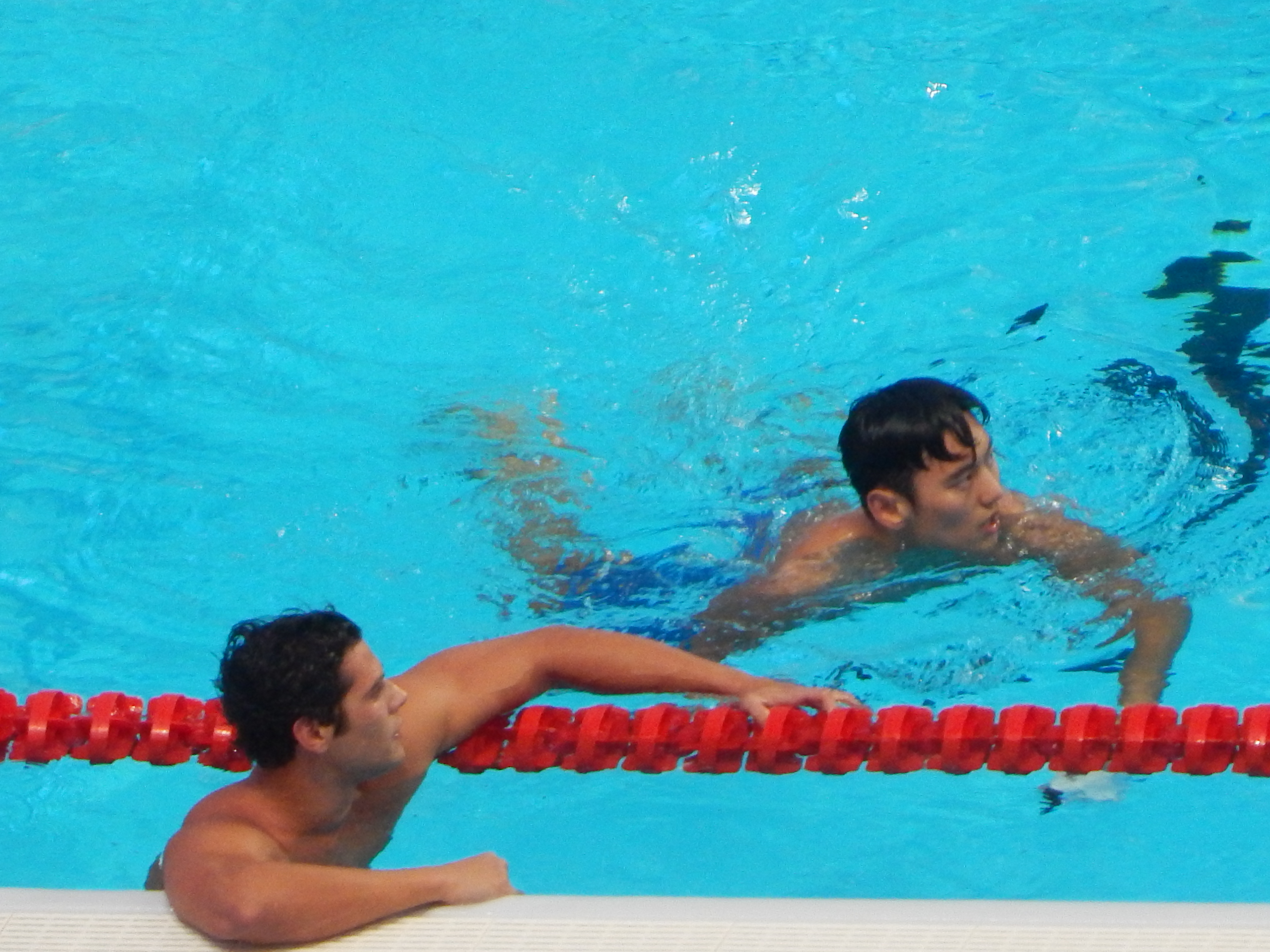 После финала на 100 метров в/с